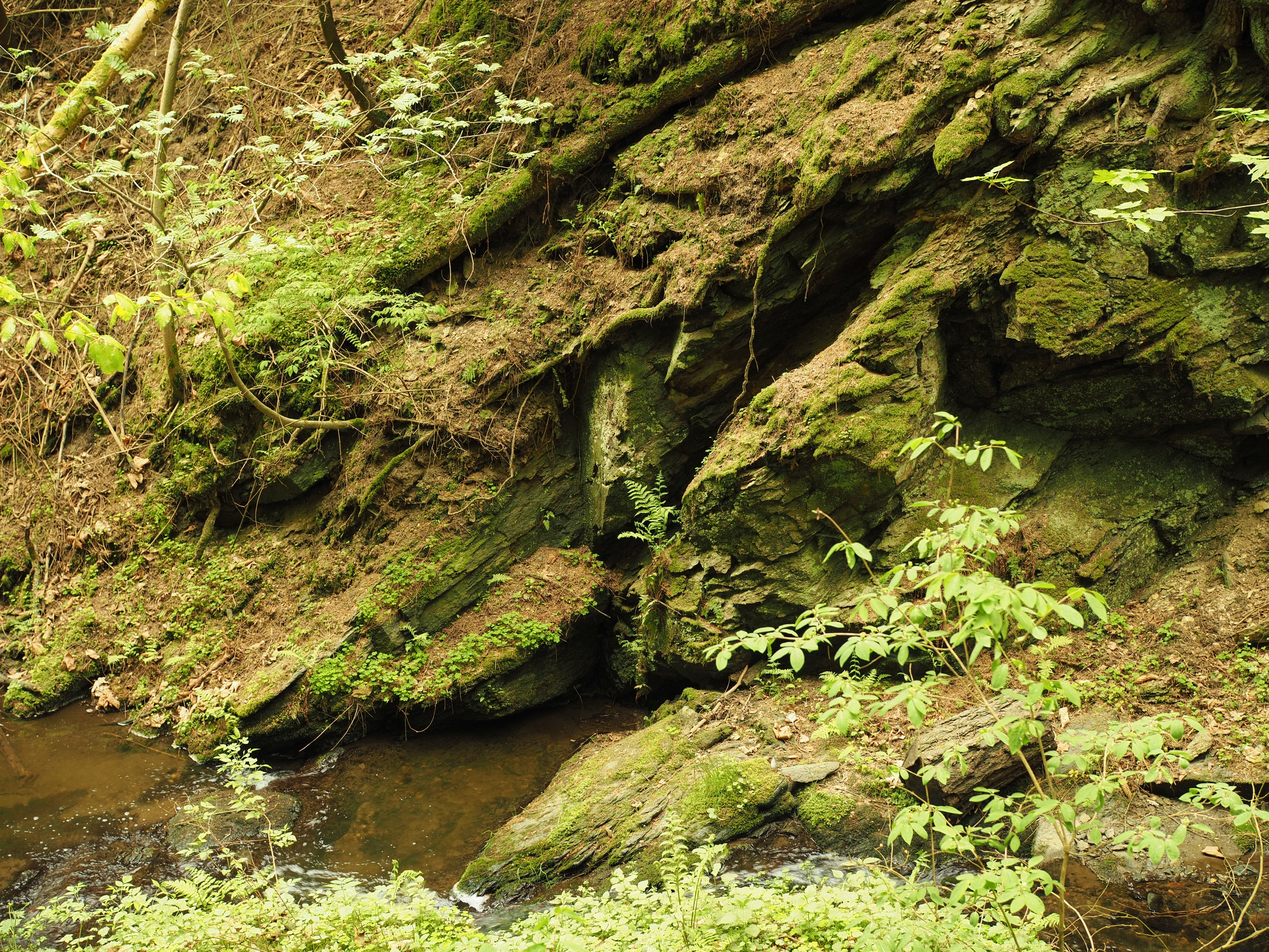 Přírodní rezervace Kavinský potok (Nature reserve Kavinský potok) Project: Chráněná území.